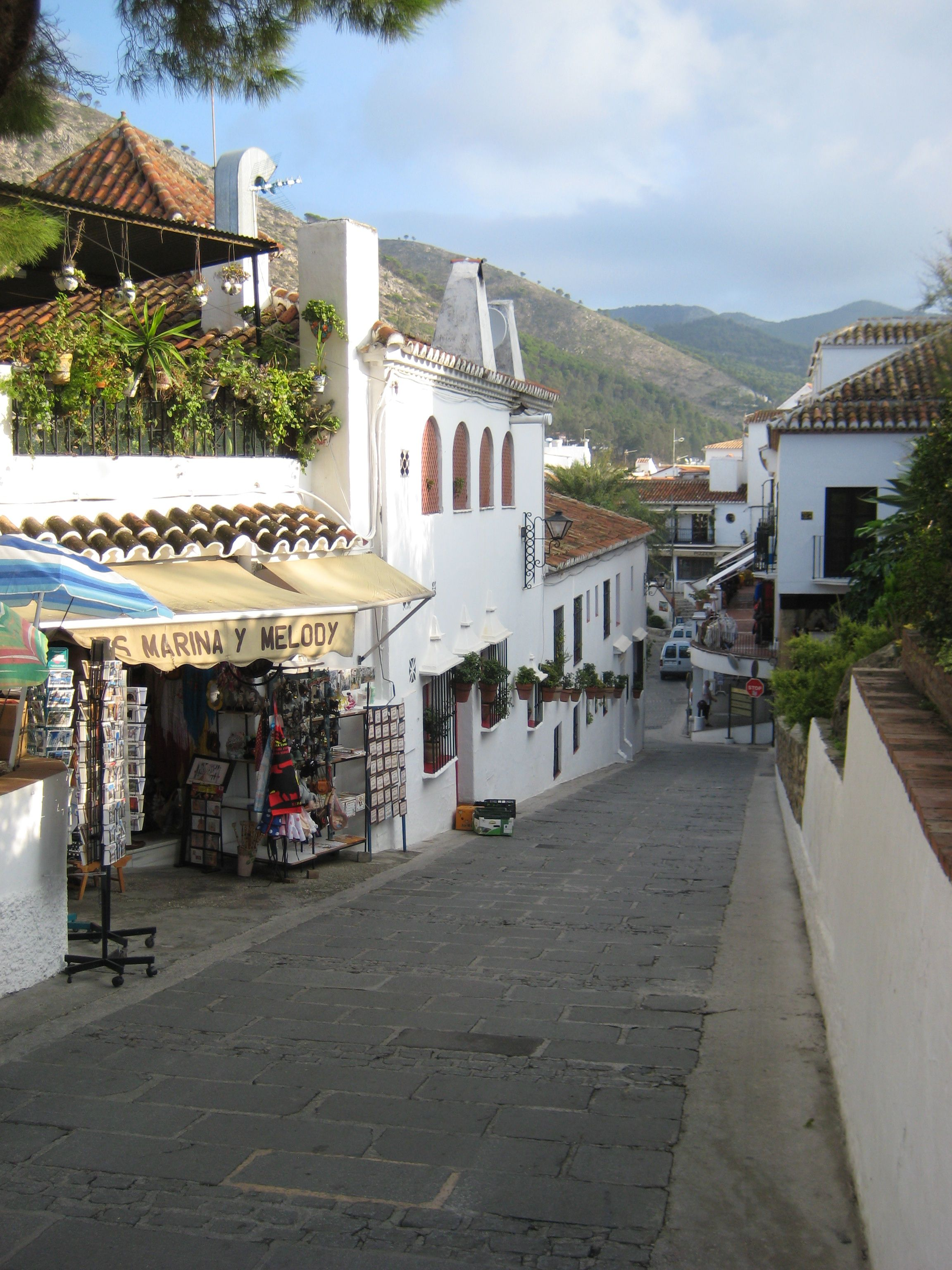 Mijas, eng enk Gässel